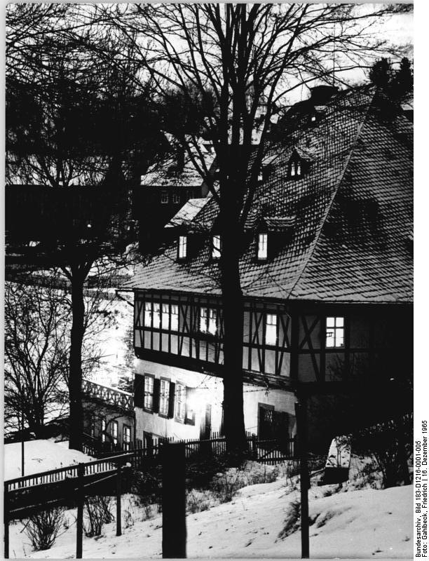 Frohnau, Blick auf den Dorfklub Zentralbild Gahlbeck schw 16.12.1965 Der "Frohnauer Hammer" ist das Zentrum des besten Dorfklubs im Bezirk Karl-Marx-Stadt. In diesem Klub arbeiten 18 Zirkel und Arbeitsgemeinschaften, deren Teilnehmer zu 75% aus Jugendlichen bestehen. Der "Frohnauer Hammer" ist auch Museum und zugleich beliebtes Ausflugsziel. Der Leiter des Museums ist gleichzeitig der Dorfklubleiter. Das besondere Augenmerk wird in der Zirkelarbeit auf die traditionellen erzgebirgischen Volkskunstarbeiten gelenkt. (Weitere Motive über die Arbeit des Dorfklubs sind vorhanden.)